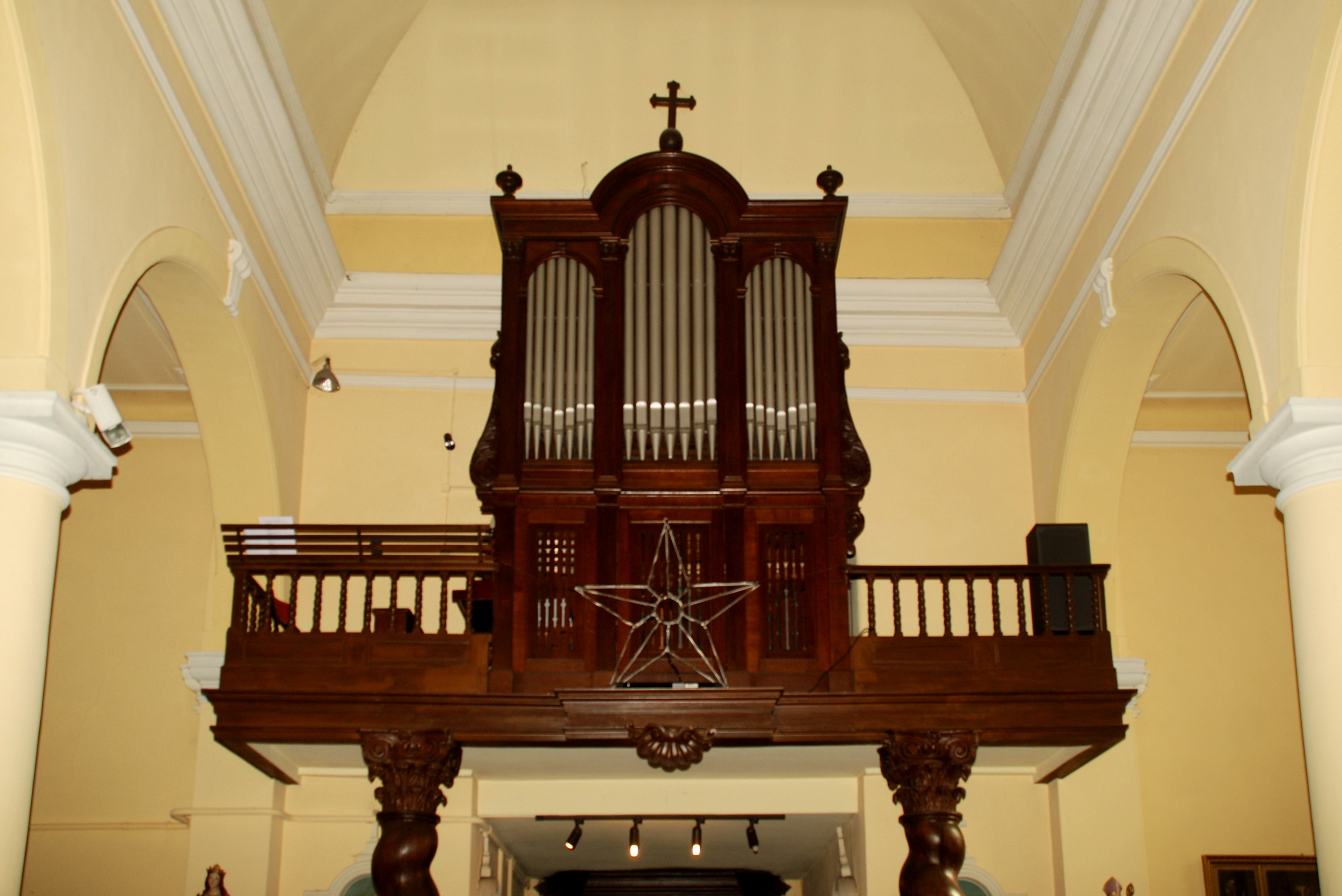 Belgique - Brabant wallon - Mont-Saint-Guibert - Église Saint-Guibert